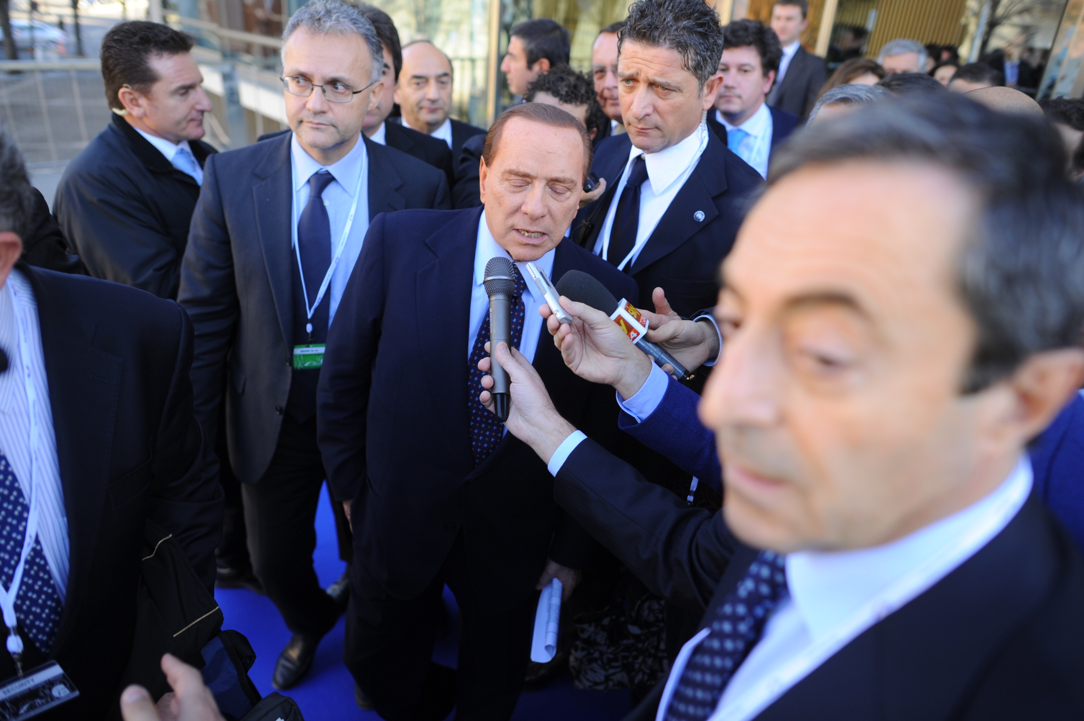 EPP Congress Marseille 2011 - Silvio Berlusconi